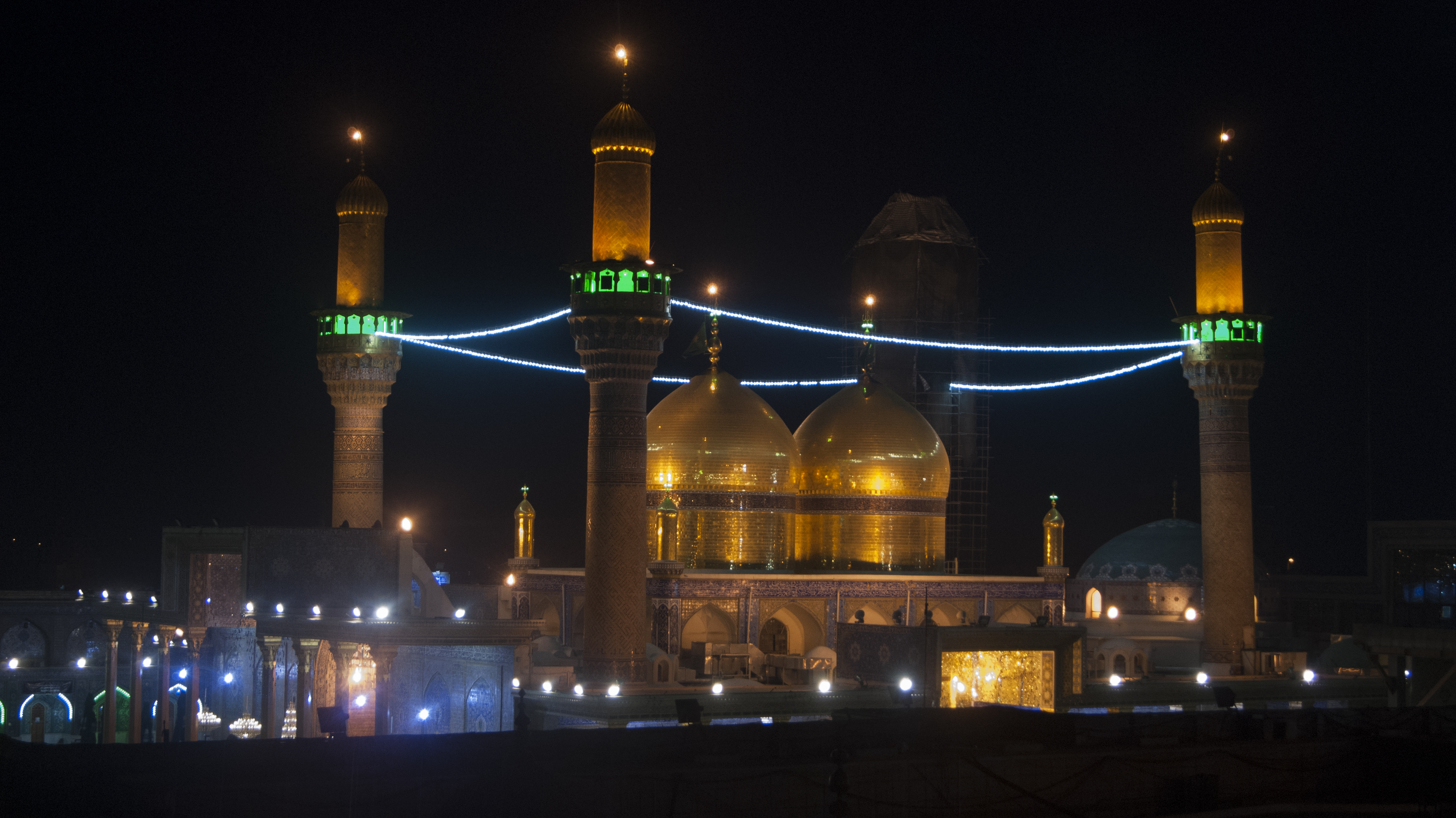 حرم کاظمین